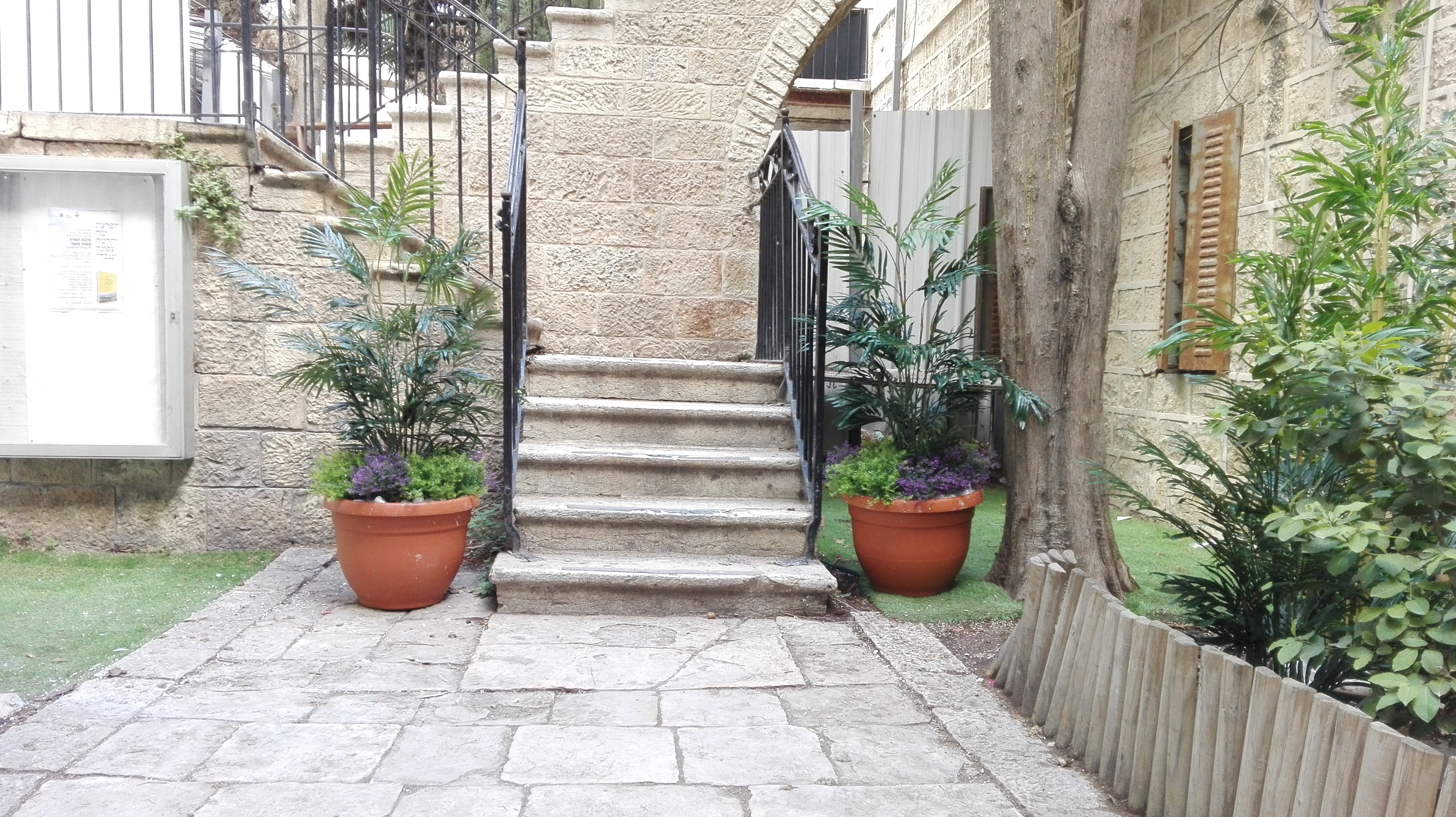 בית הרב קוק-שביל הכניסה